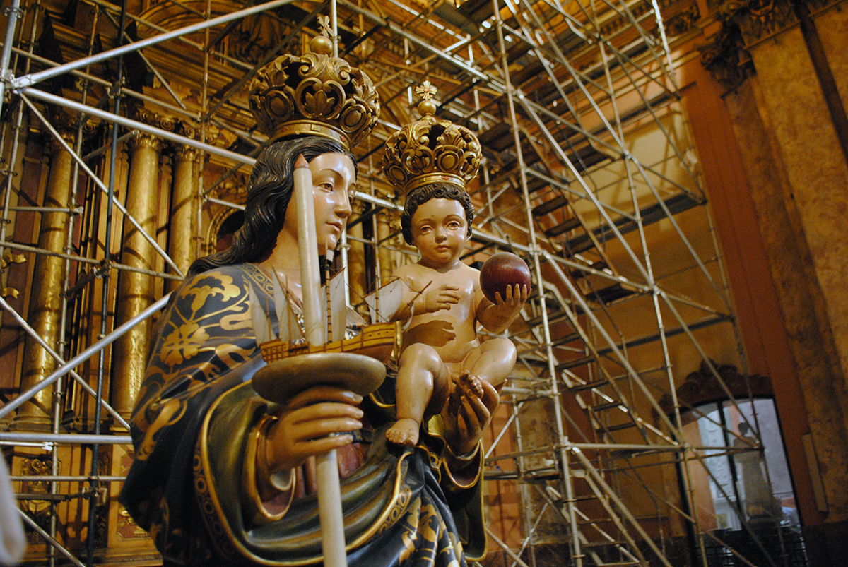 Imagen de Nuestra Señora del Buen Aire. Catedral de Buenos Aires, Argentina.